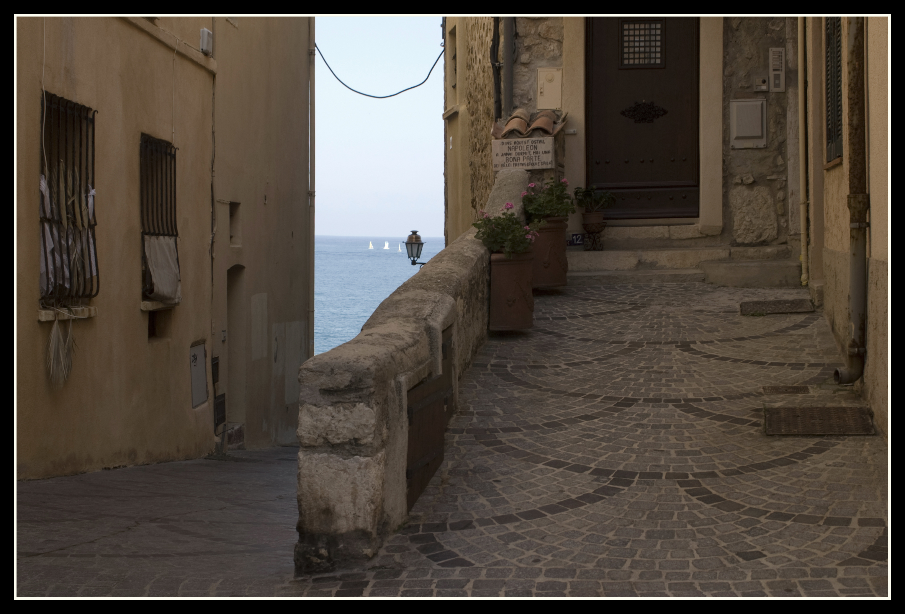 Rue de l`Orme